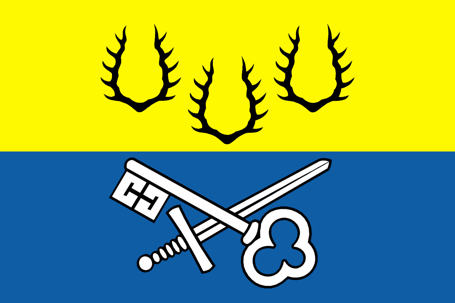 Vlajka Holýšov